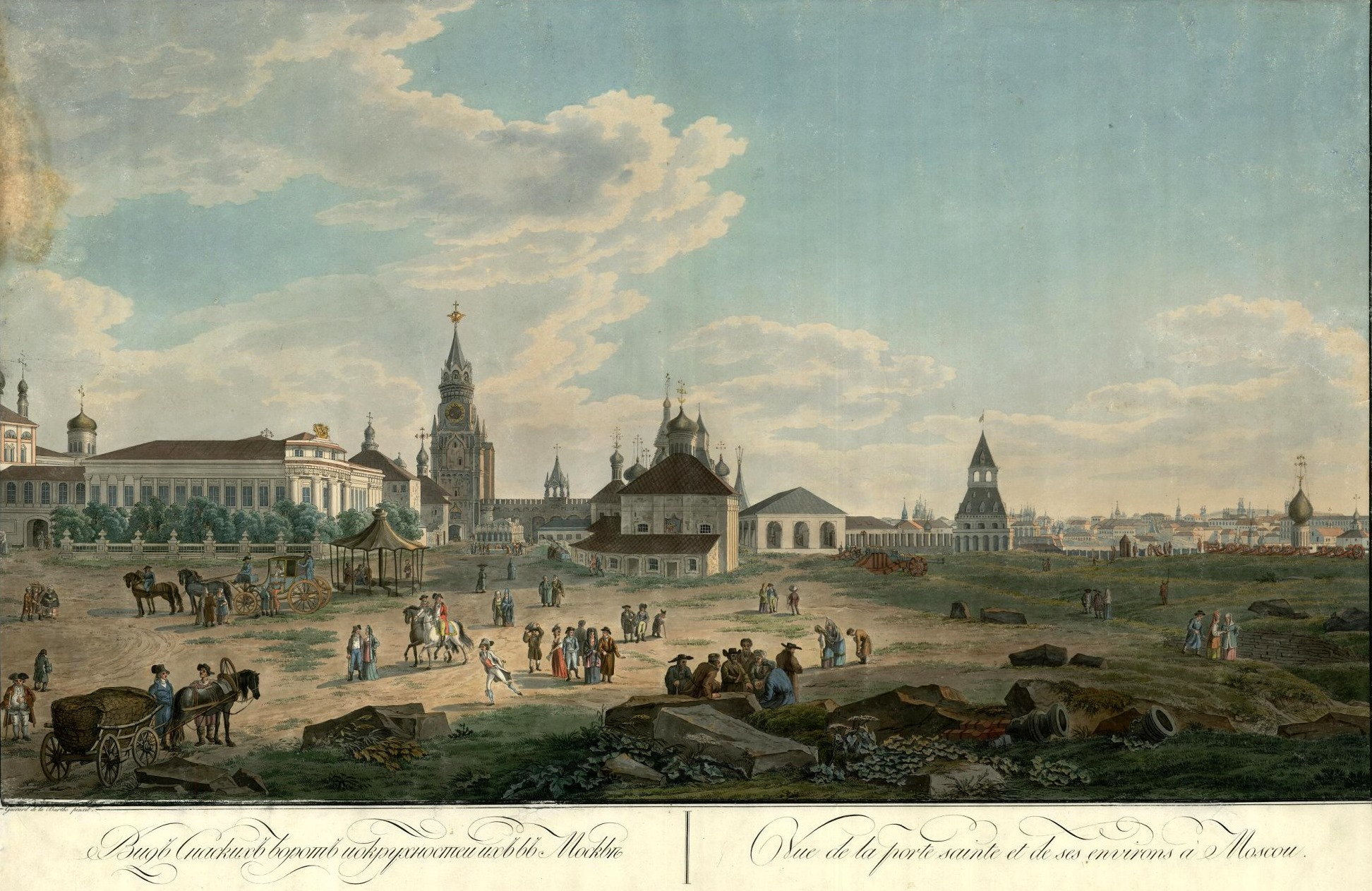 Вид на юго-восточную часть Кремля с церковью Николы Гостунского (в центре). Графика конца ХVIII - начала ХIХ века.